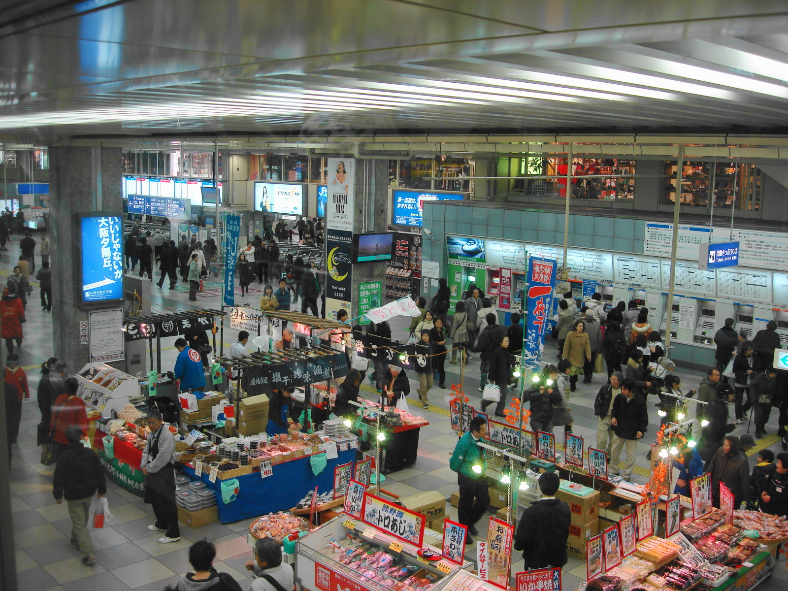 JR TennojiSta